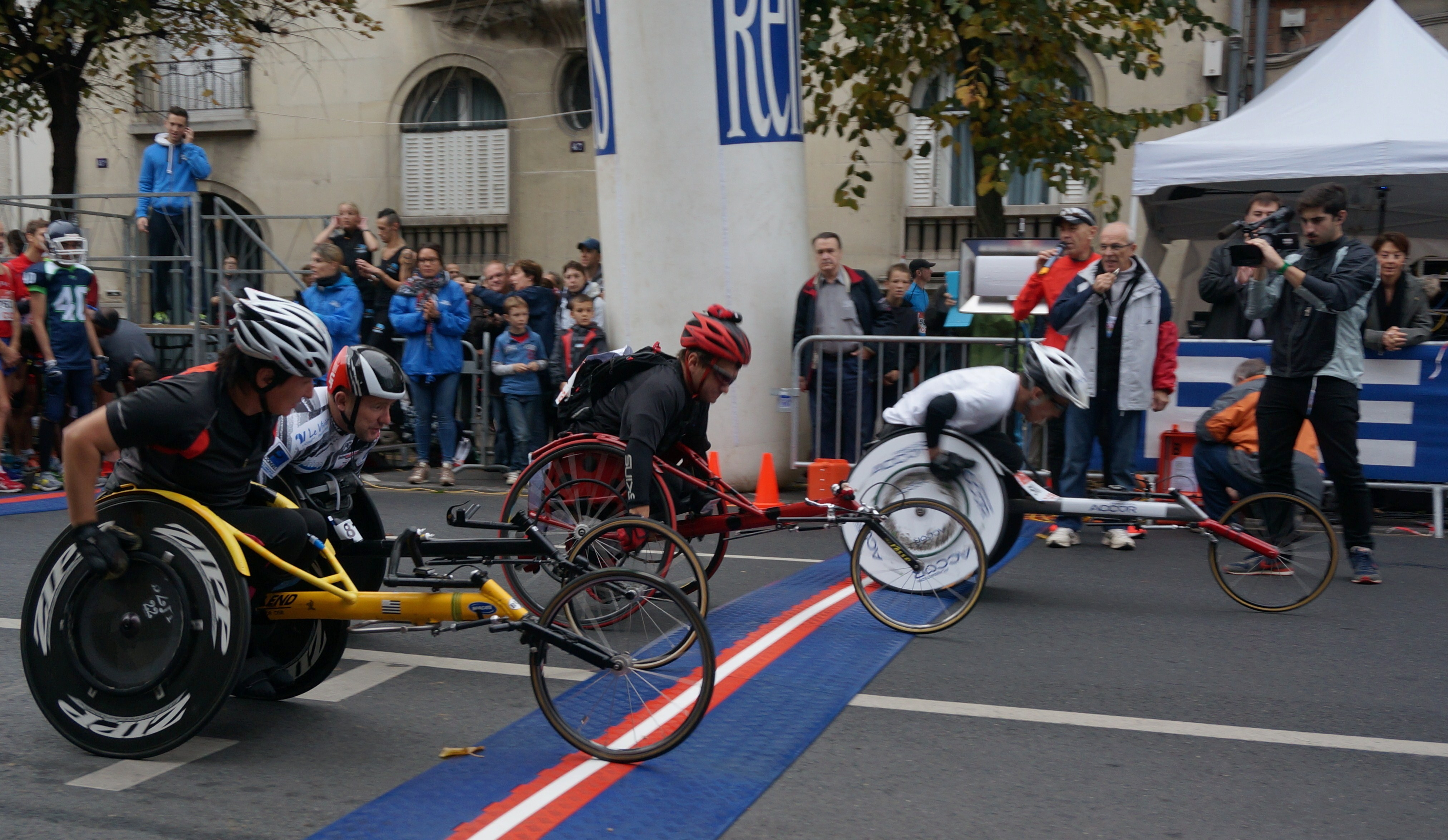 Lors de Reims à Toutes Jambes 2013 .